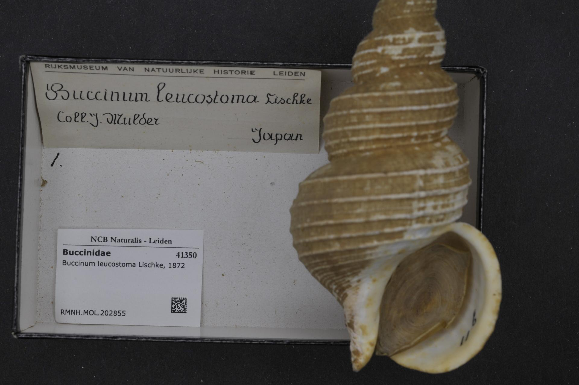 Buccinum leucostoma Lischke, 1872